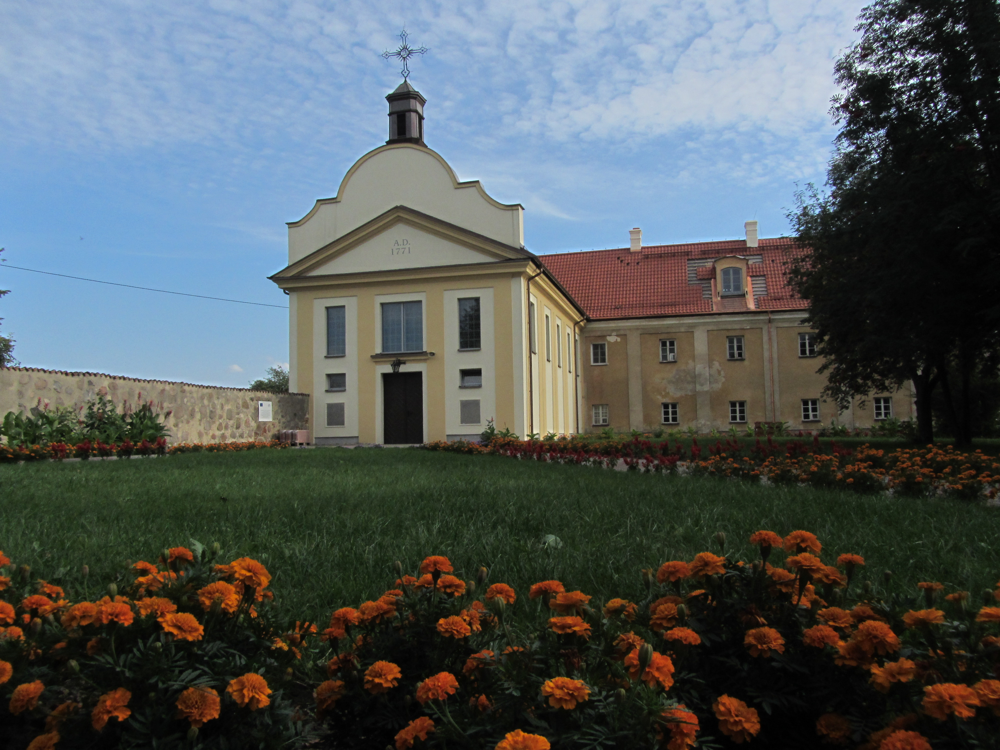 Tykocin - zespół klasztorny Bernardynówe, 1771-1791: lasztor bernardynów oraz kaplica p.w. św. Elżbiety (zabytek nr 118 z 10.05.1958)